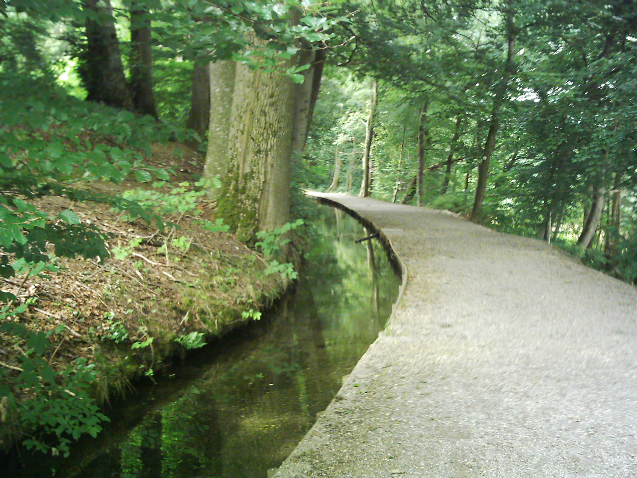 Der Krummbach ist ein von Benediktinern im 15. Jahrhundert künstlich angelegter Bach, ein sogenannter Benediktiner-Klosterwaal in Ochsenhausen im Landkreis Biberach in Baden-Württemberg.